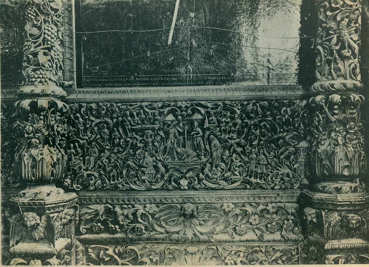 Част от иконостаса в църквата "Свети Йоан Предтеча" на Бигорския манастир, дело на Петре Гарката и неговите помощници. Фотограф Г. Трайчев. От: Албум "Бигорския монастир "Св. Иван Предтеча", София б.д.